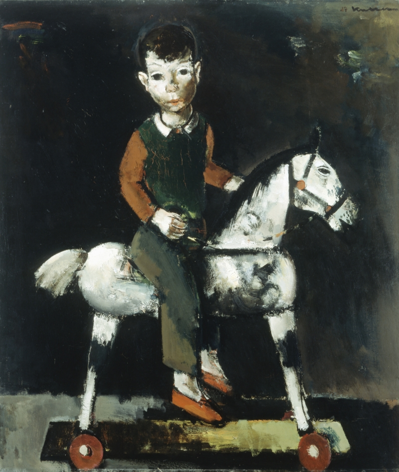 Wooden Horselabel QS:Len,"Wooden Horse" label QS:Lfr,"Cheval de bois"